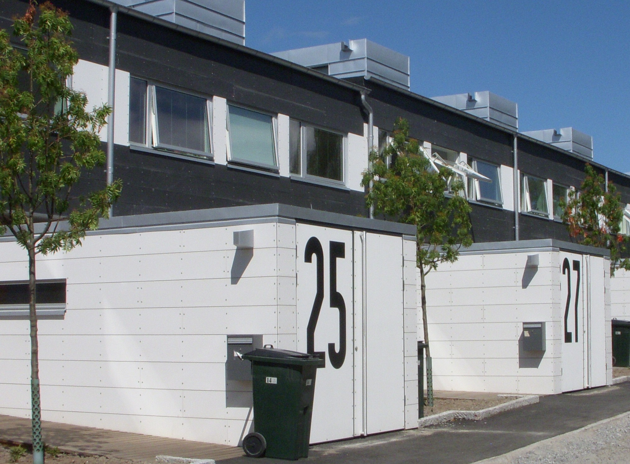 Kvaretert Barnmorskan, detalj, fasadbeklädnad med fibercementskivor